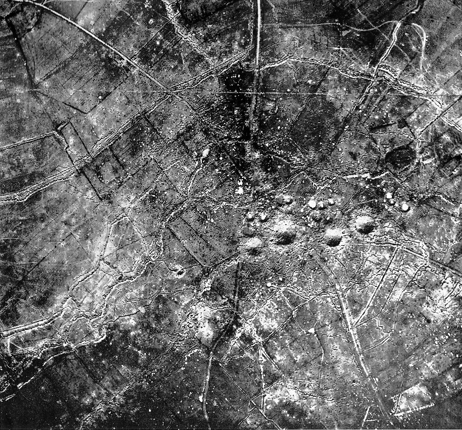 Die ‘‘St. Eloi-Stellung‘‘ am 1. April 1916 (Fliegerphotographie)